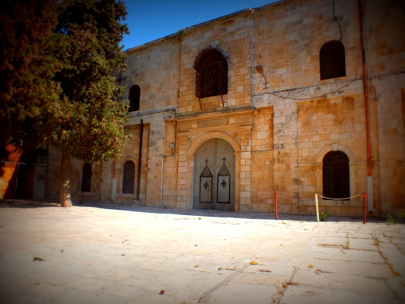 երուսաղեմի ժառանգավորաց վարժարան